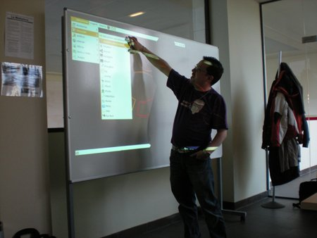 clase d'Edubuntu